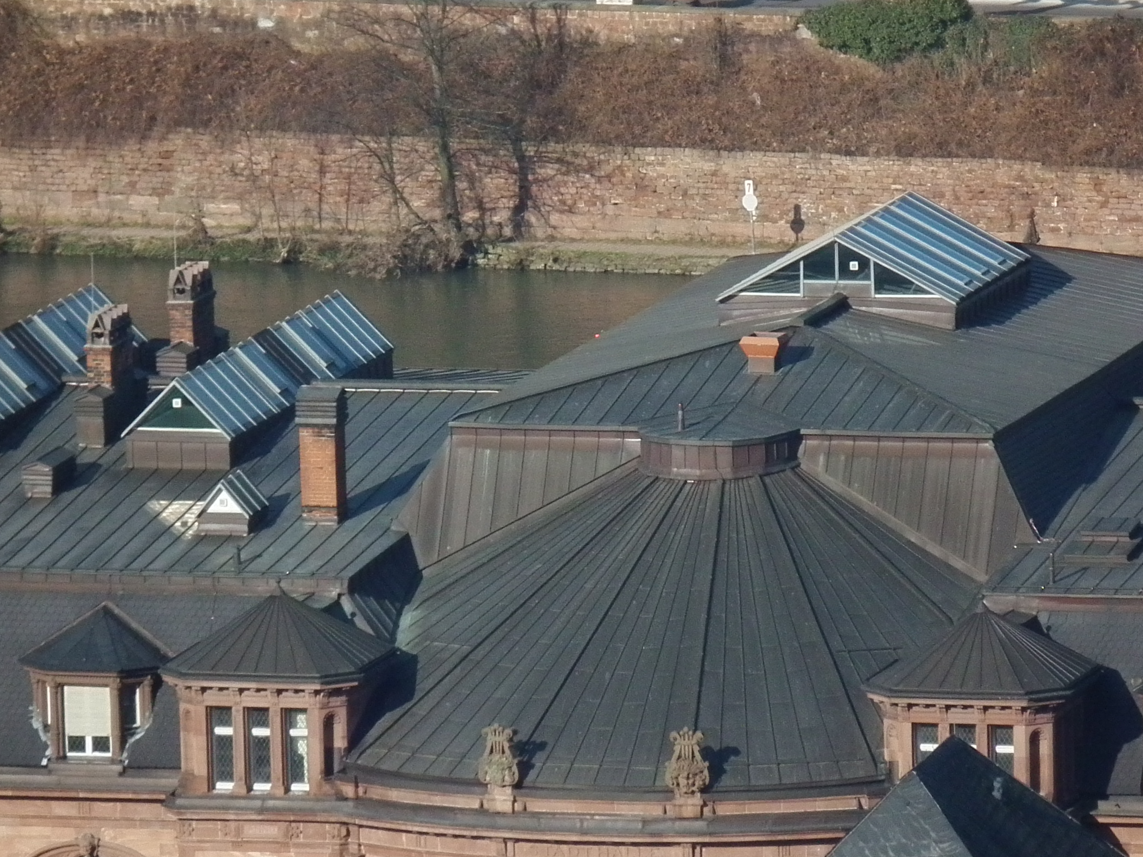 Dachfläche der Stadthalle in Heidelberg (Baden-Württemberg, Deutschland), im Hintergrund der Neckar und die Sandsteinmauer am Neuenheimer Ufer